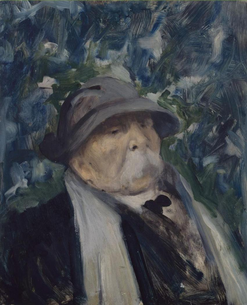 Portrait de Georges Clemenceau